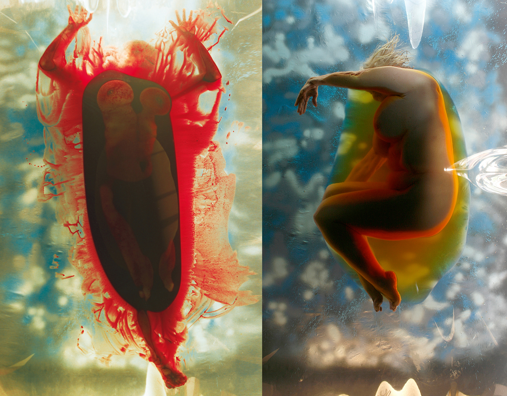 2012 - Aus der Serie Schlafstellung feminin, Globuswerke Leipzig, Fotografie von Dieter Gerschler